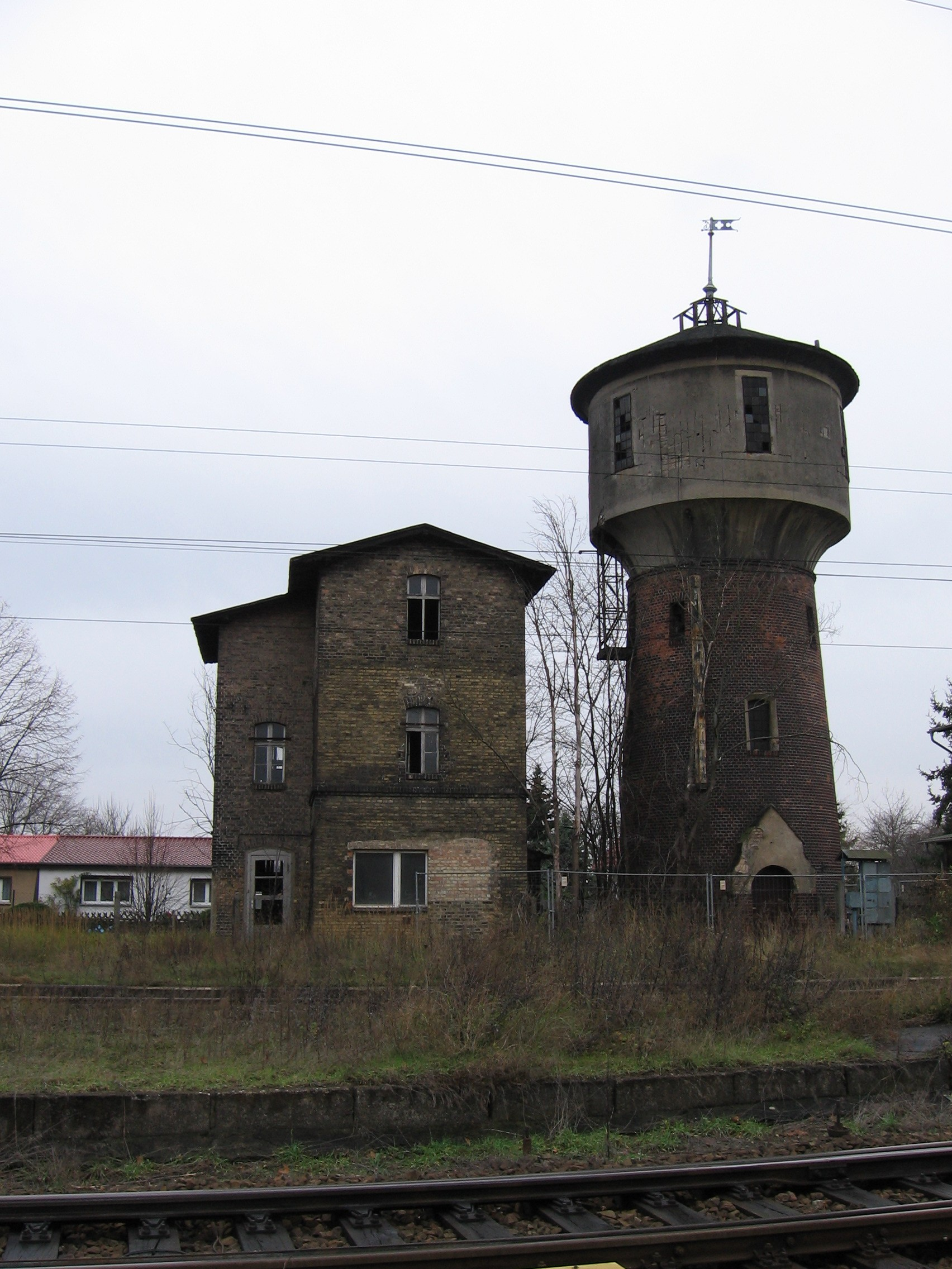 Berliner Nordbahn, Bf. Löwenberg/Mark, Wasserturm